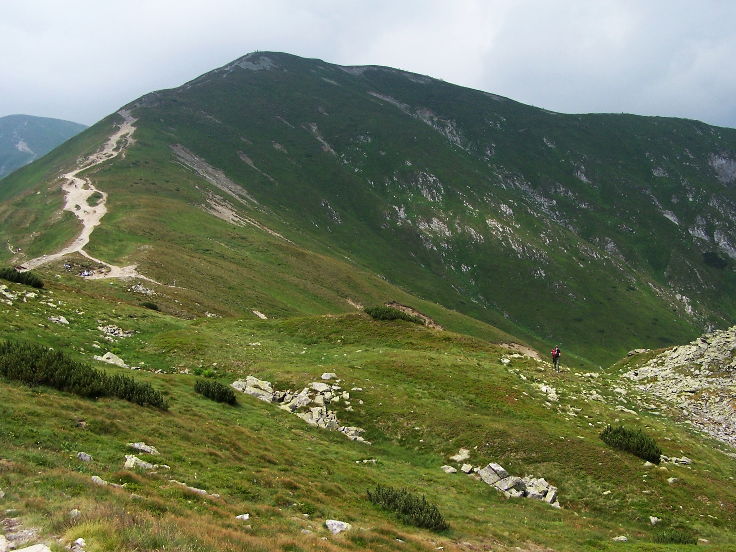 Pod Kopą Kondracką Przełęcz